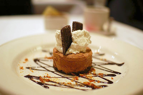 Semifreddoes